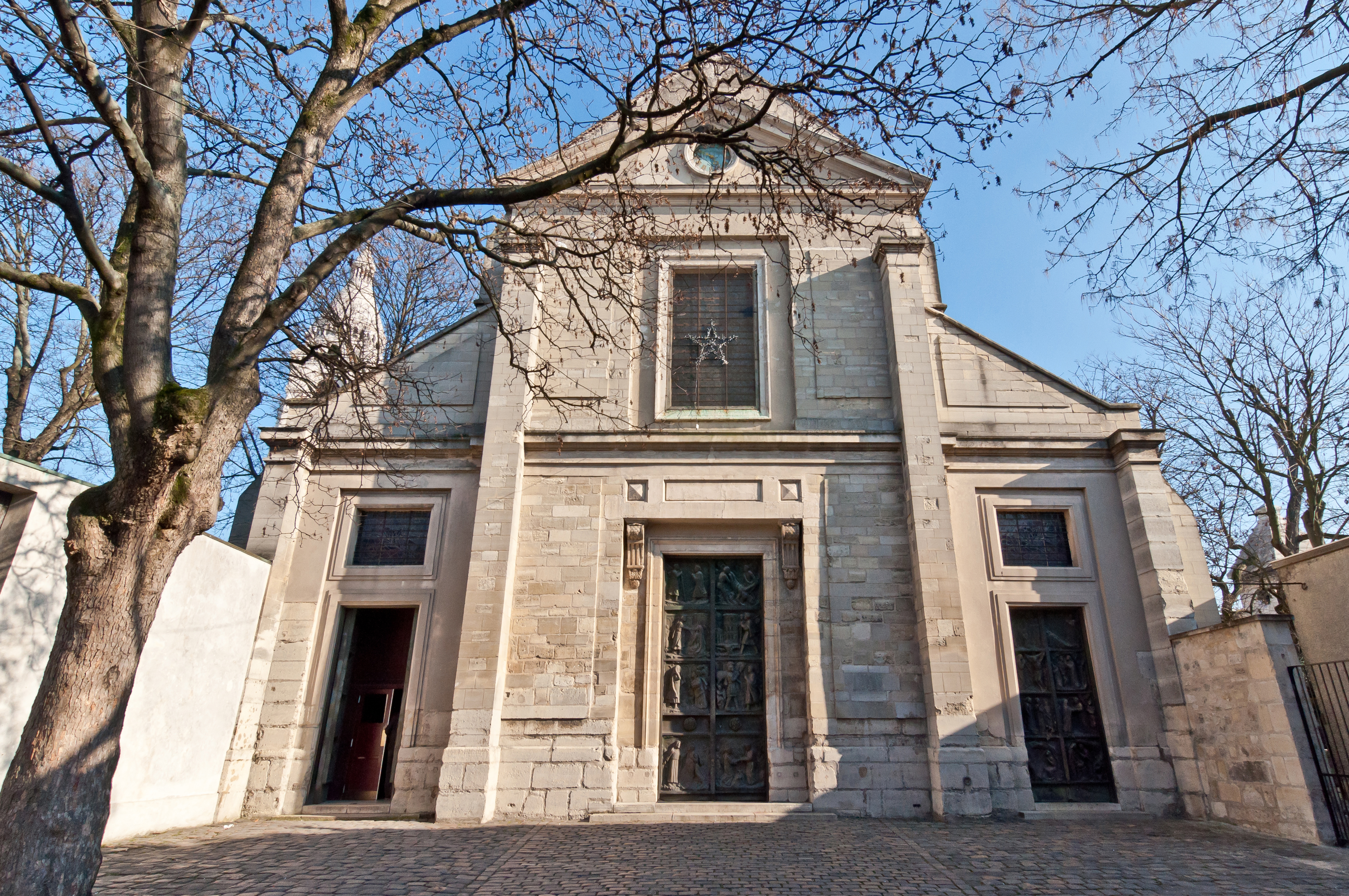 Église Saint-Pierre de Montmartre - portail d'entrée